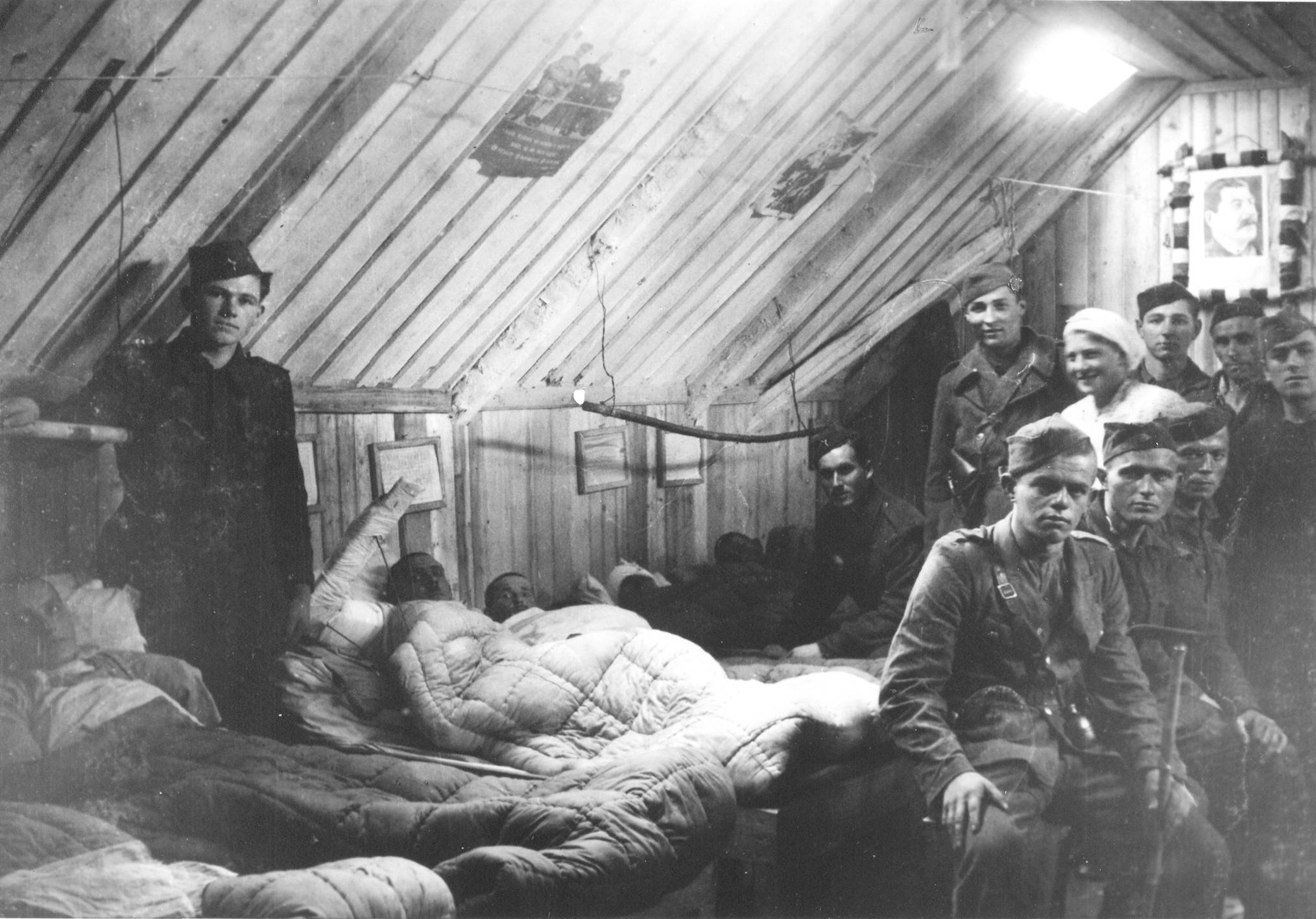 Ranjenci in bolničari v partizanski bolnišnici Jelendol v Kočevskem Rogu.